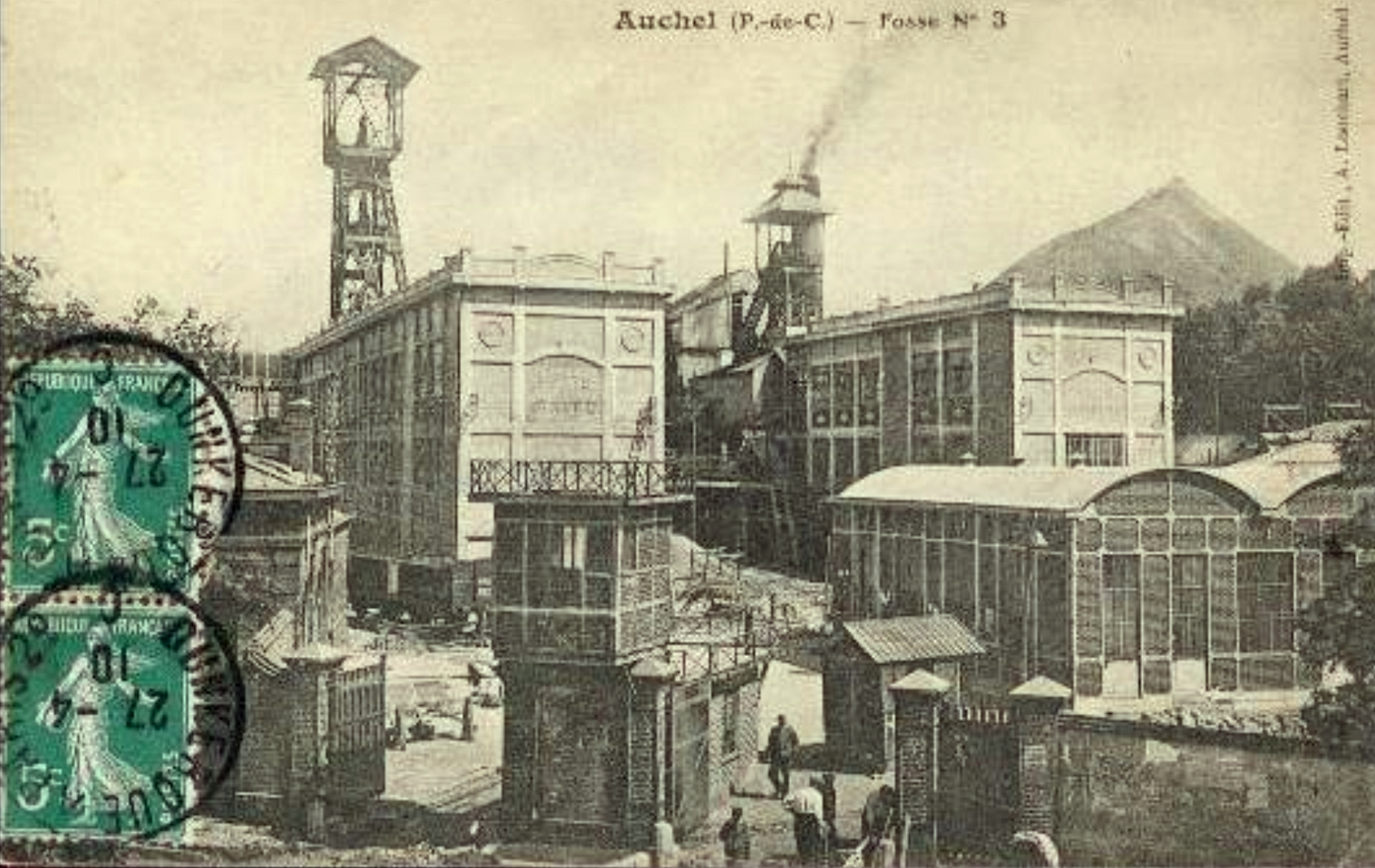 La Fosse n° 3 - 3 bis - 3 ter de la Compagnie des mines de Marles était un charbonnage constitué de trois puits situé à Auchel, Pas-de-Calais, Nord-Pas-de-Calais, France.